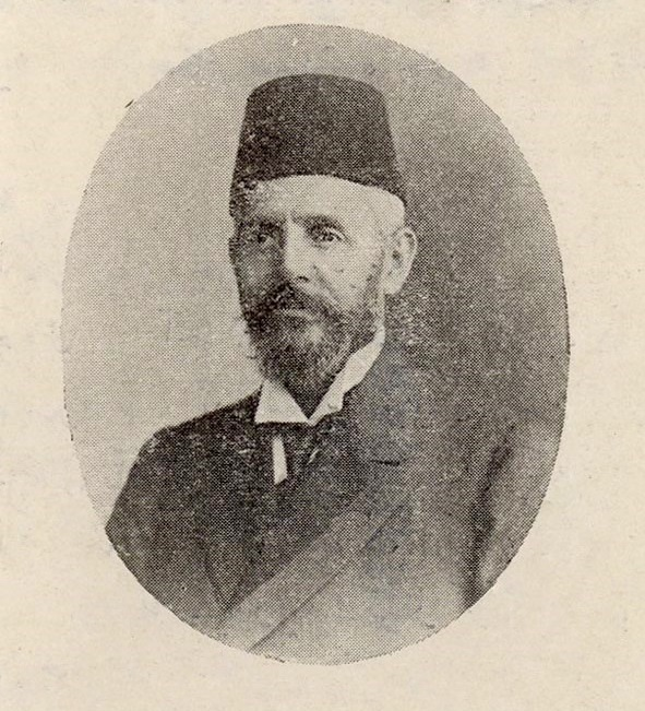 Emanuel Karasu, Osmanlı Yahudisi milletvekili.